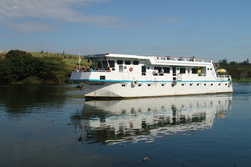 Imagem do município de Barra Bonita, estado de São Paulo, Brasil.